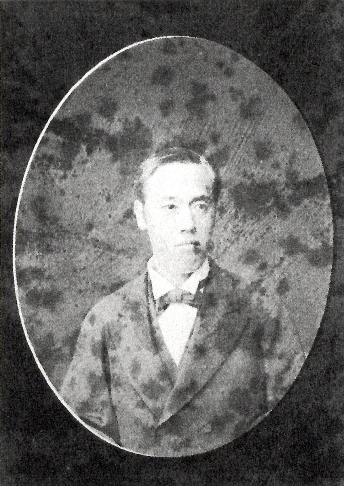 西尾忠篤の肖像写真。